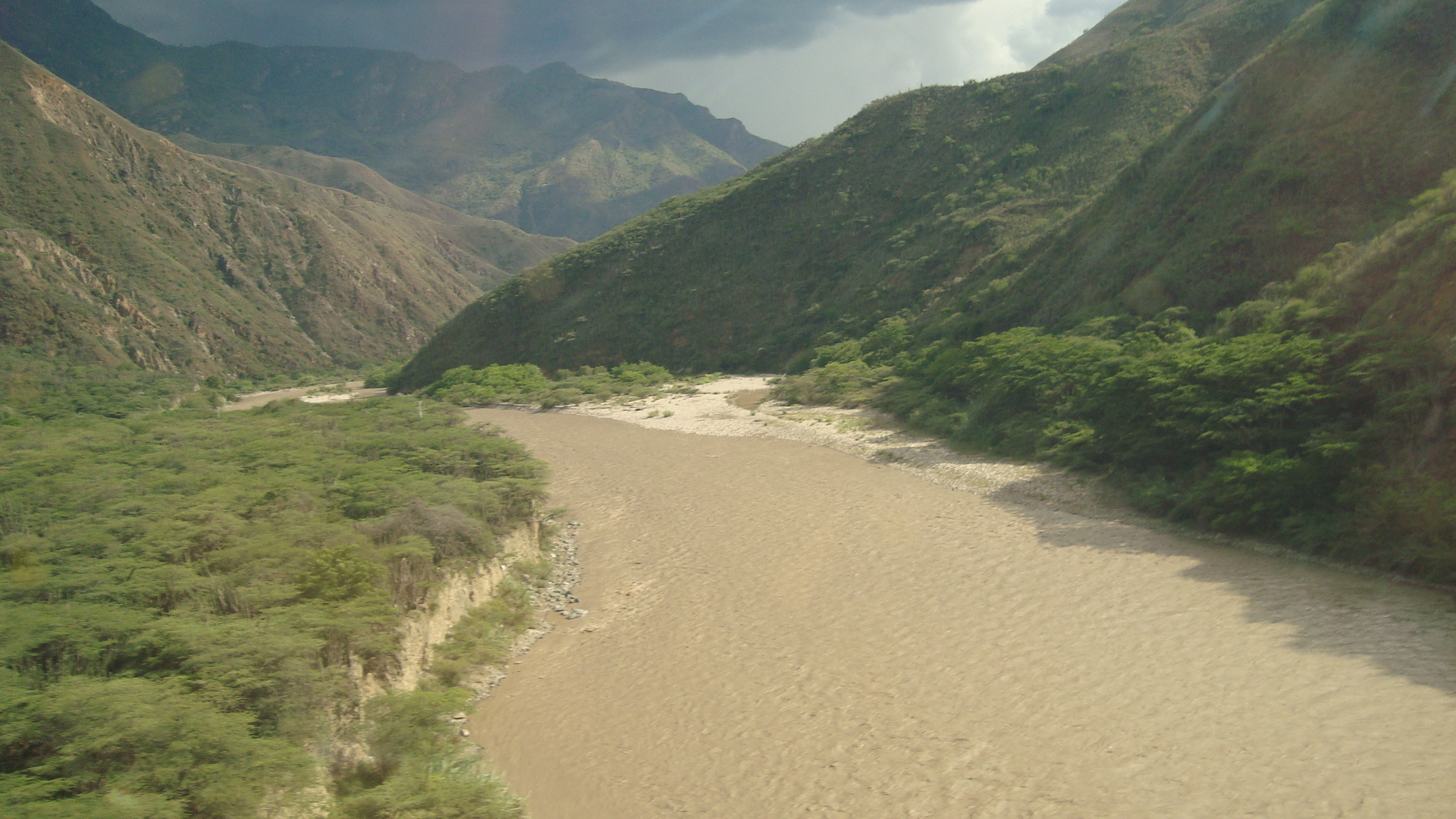 cañon